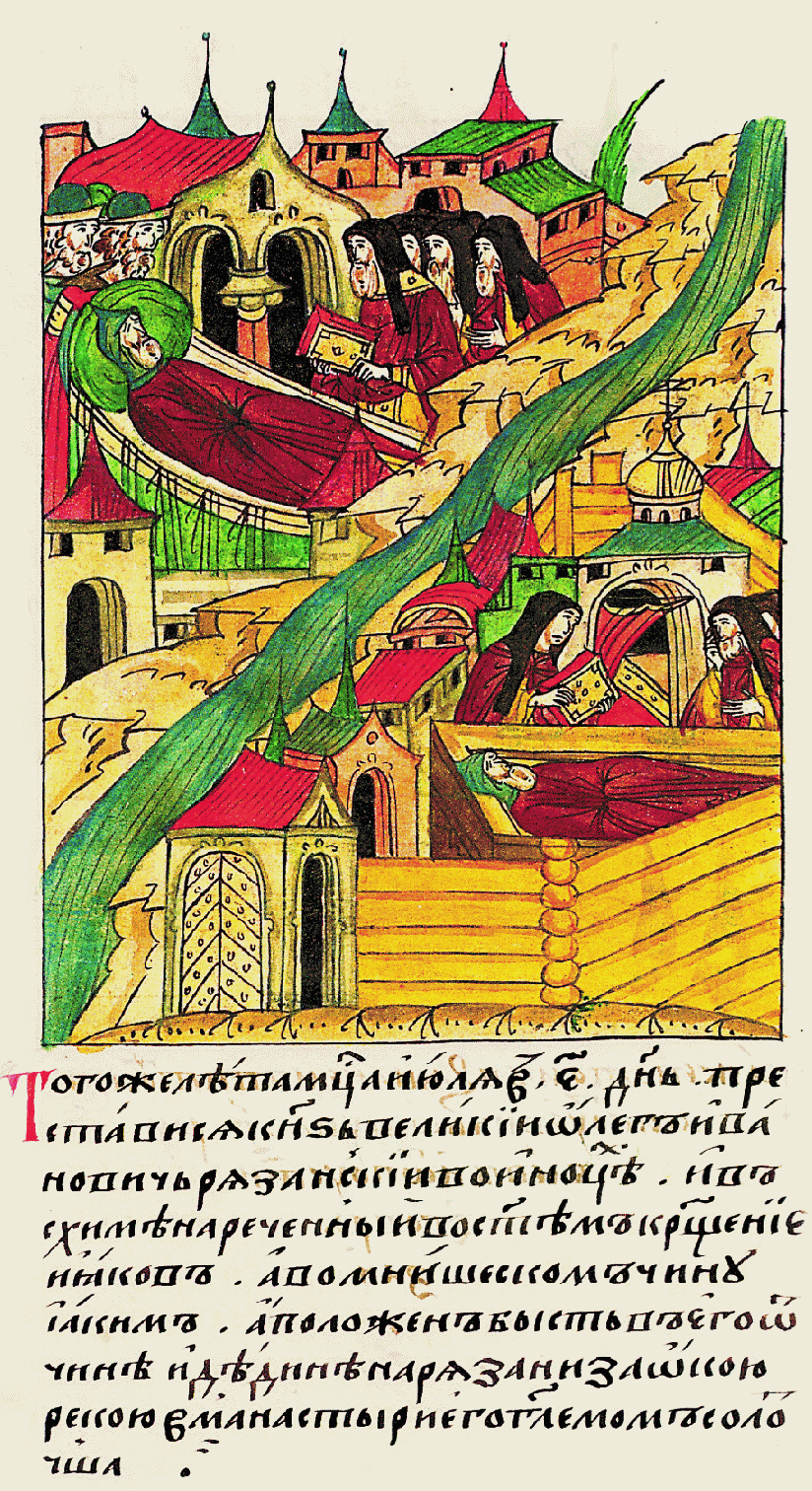 В том же году месяца июля в 5 день пре- ставился великий князь Олег Иванович Рязанский в иноках и схиме, названный в святом крещении Иаков, а в монашестве Иоаким, похоронен был в своей отчине и дедине в Рязани за рекой Окой в мона- стыре, называемом Солотча.